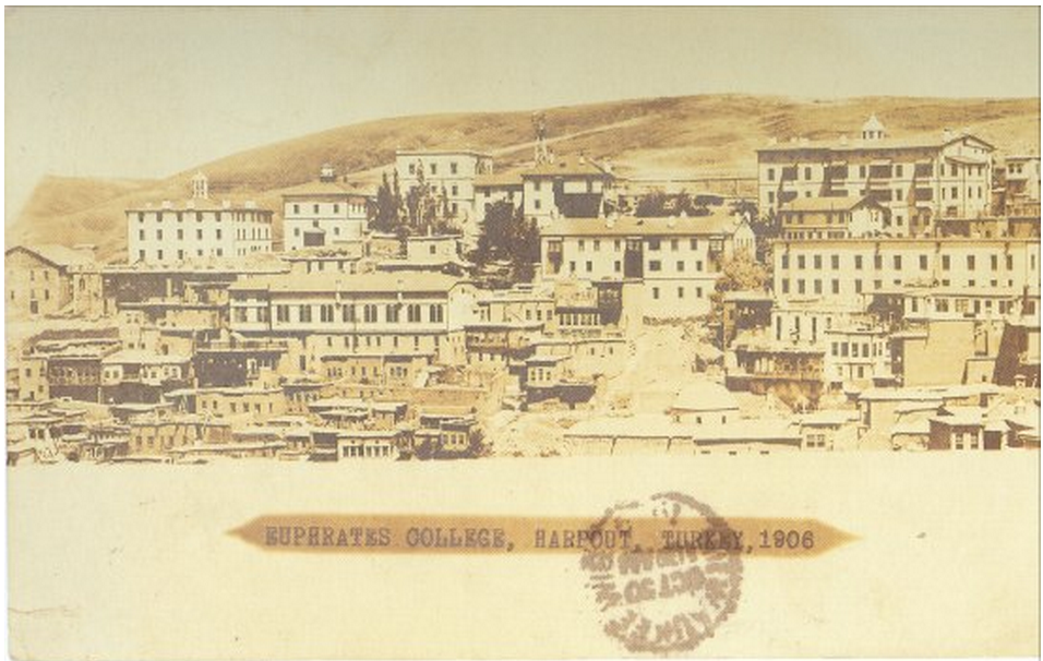 Eski Harput